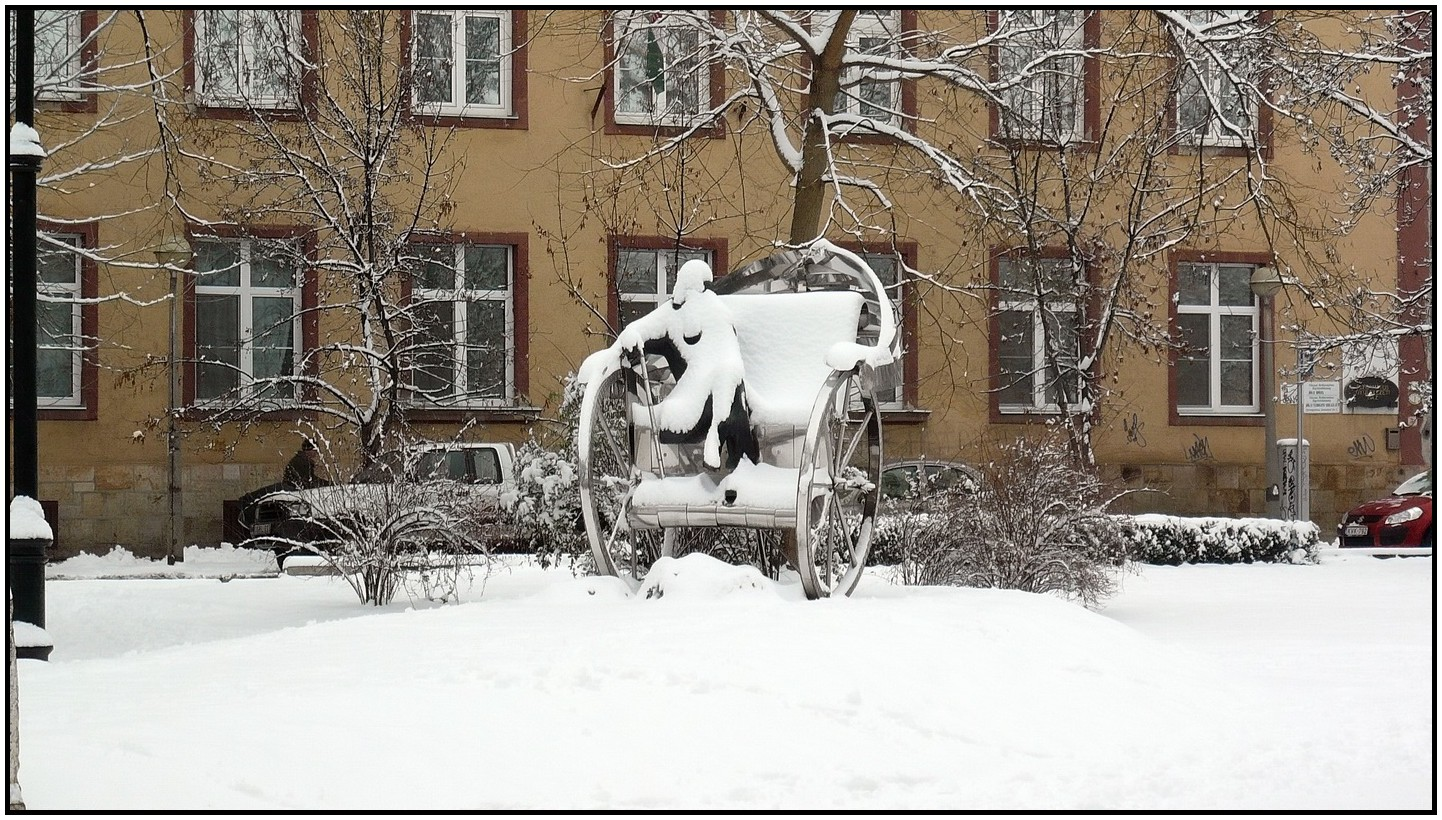 Nyíregyháza, 2008 első hó